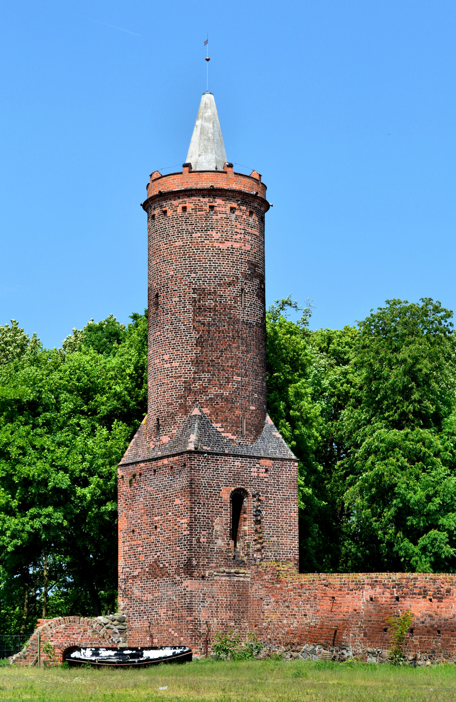 Baszta Białogłówka w Stargardzie Szczecińskim